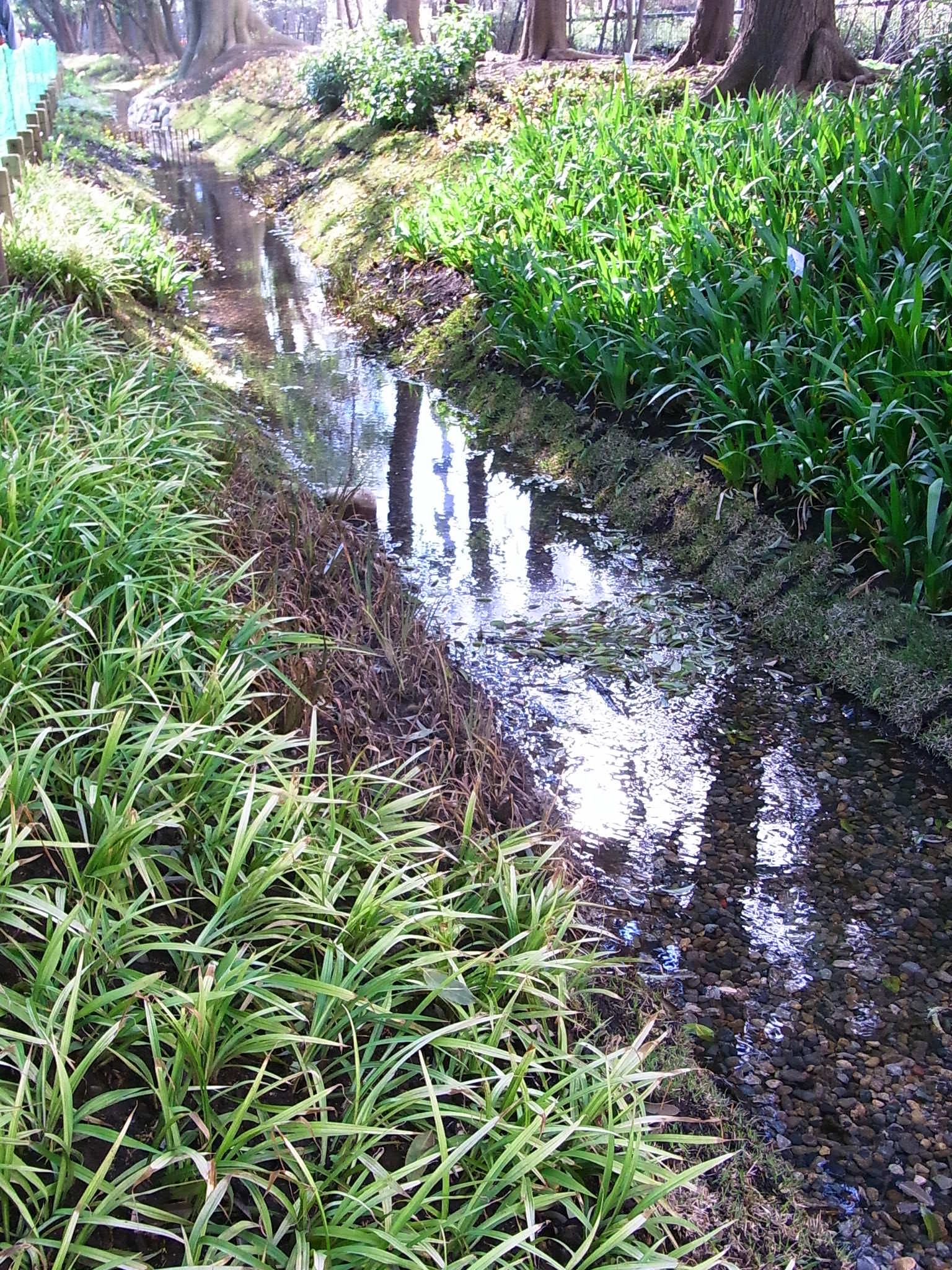 新宿御苑 玉川浄水